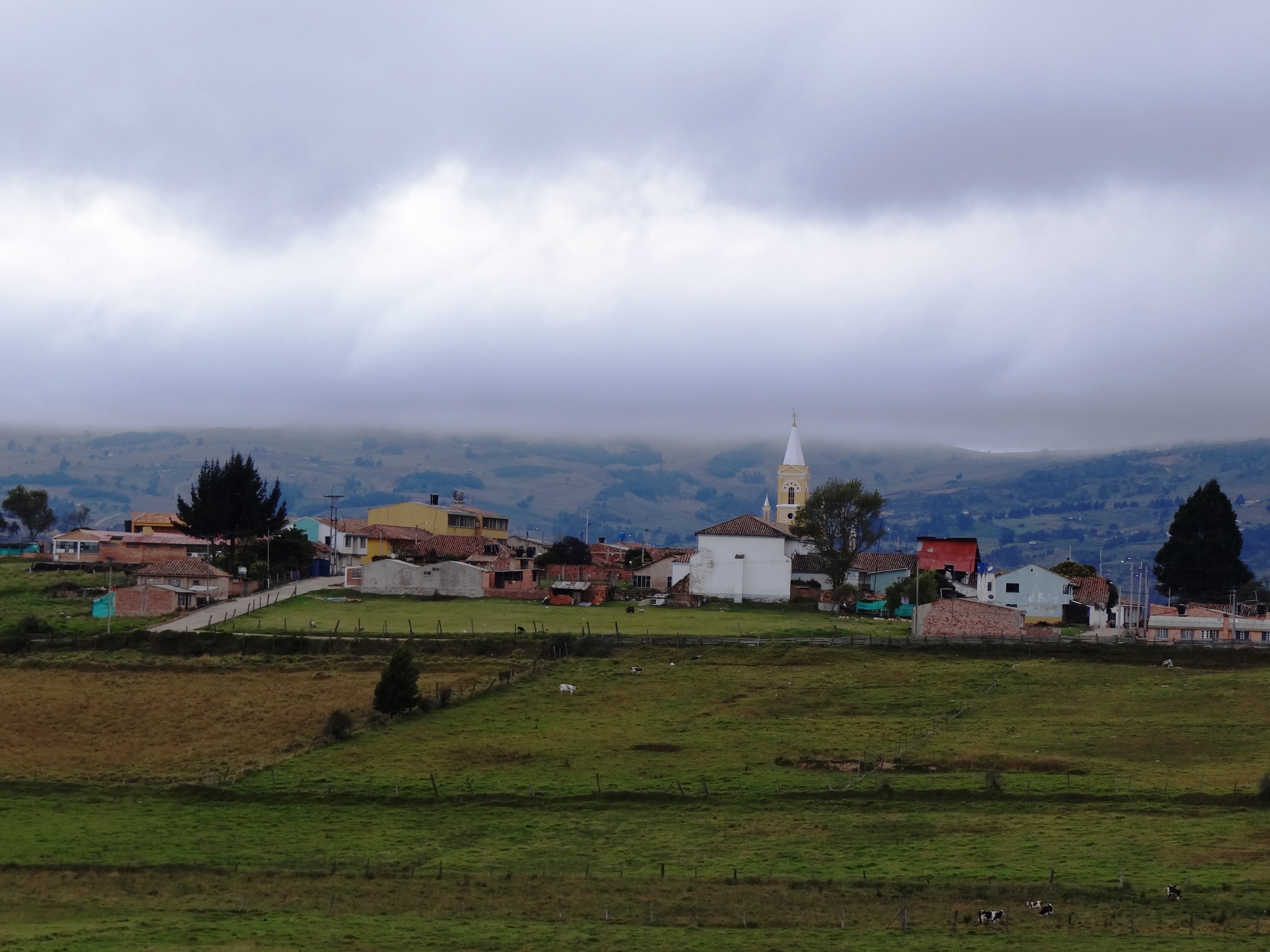 Detalle del área urbana del municipio de Motavita, departamento de Boyacá, Colombia